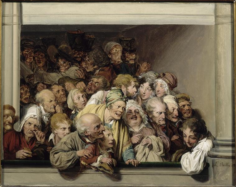 Une loge, un jour de spectacle gratuit, 32,5x41,7 cm Versailles, Musée Lambinet